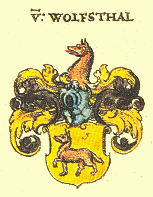 Wappen der schwäbisch- fränkischen Adelsfamilie und Nürnberger Patrizierfamilie Wolf von Wolfsthal (Wolfsthal).